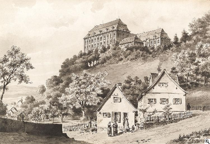 Friedrich Trost (1844–1922) – Schloß Schillingsfürst in Mittelfranken